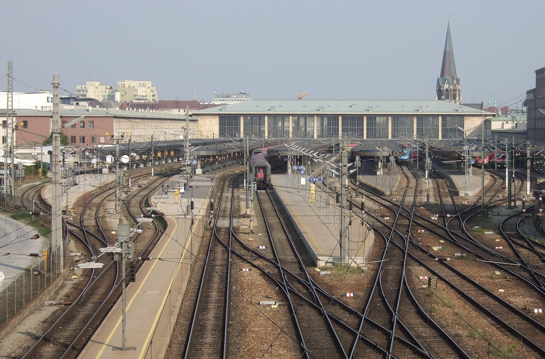 Wien Westbahnhof (western train station, Vienna)